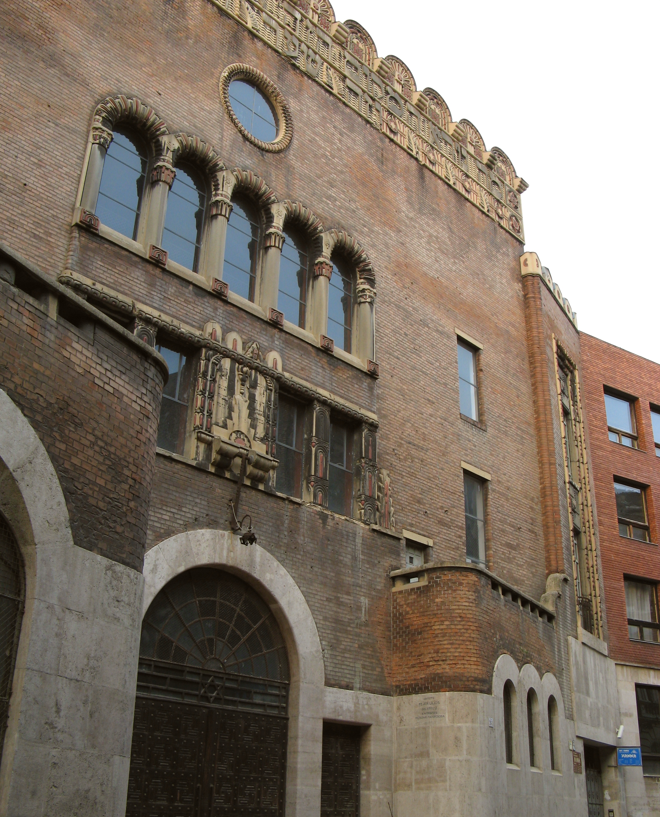 A Kazinczy utcai zsinagóga Budapesten.